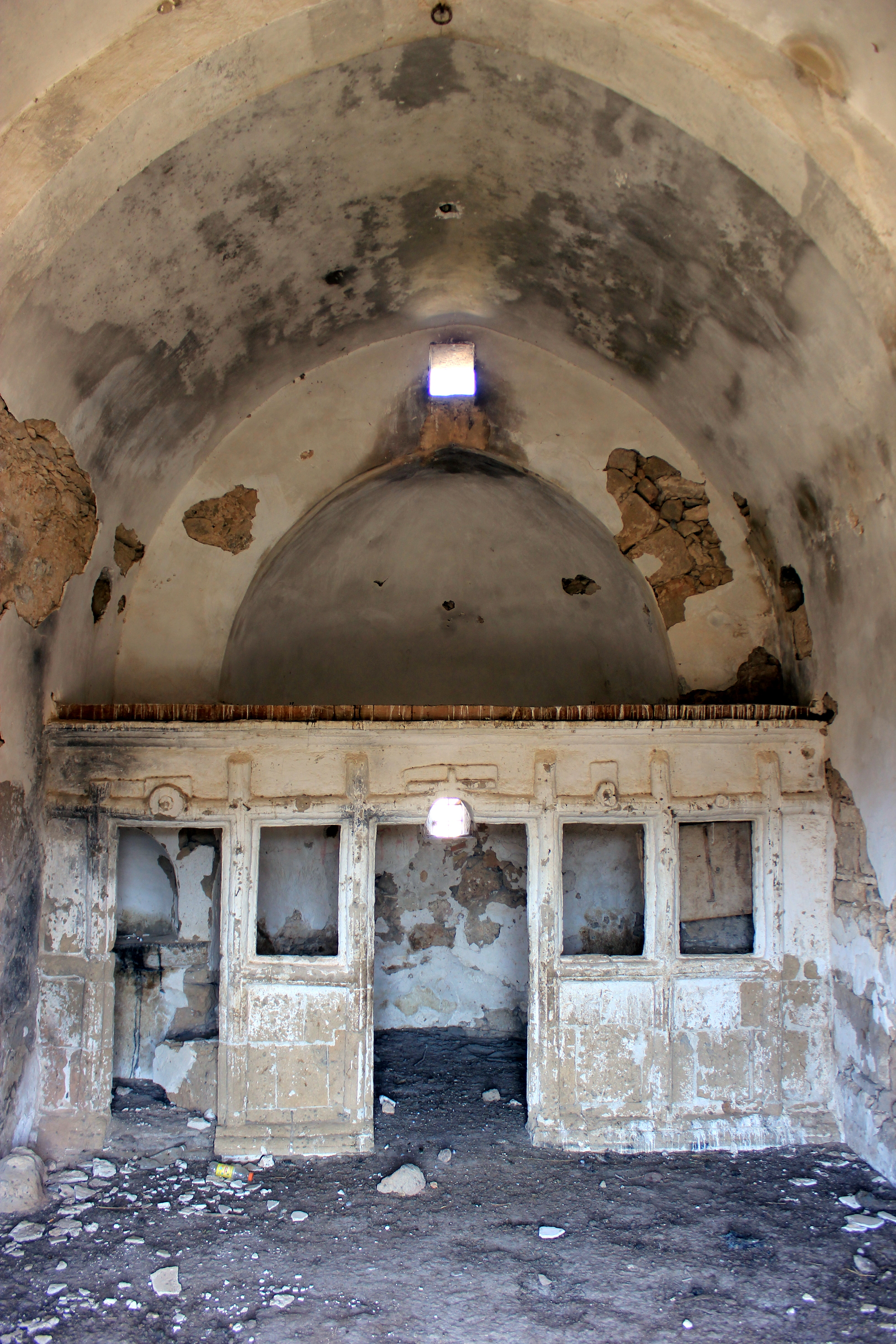 Entweihte Kapelle, nach der Kameraposition bei Çiftlikdüzü (Akanthou/Tatlısu) auf der Karpas-Halbinsel, Zypern.